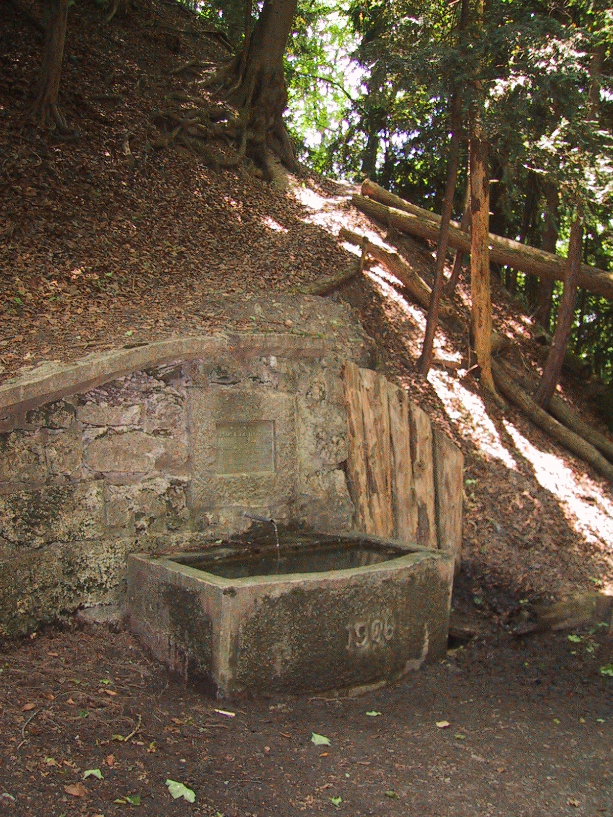 Manessebrunnen am Fusse des Burghügels der Burg Manegg. Fotograf Peter Berger (selbst fotografiert)